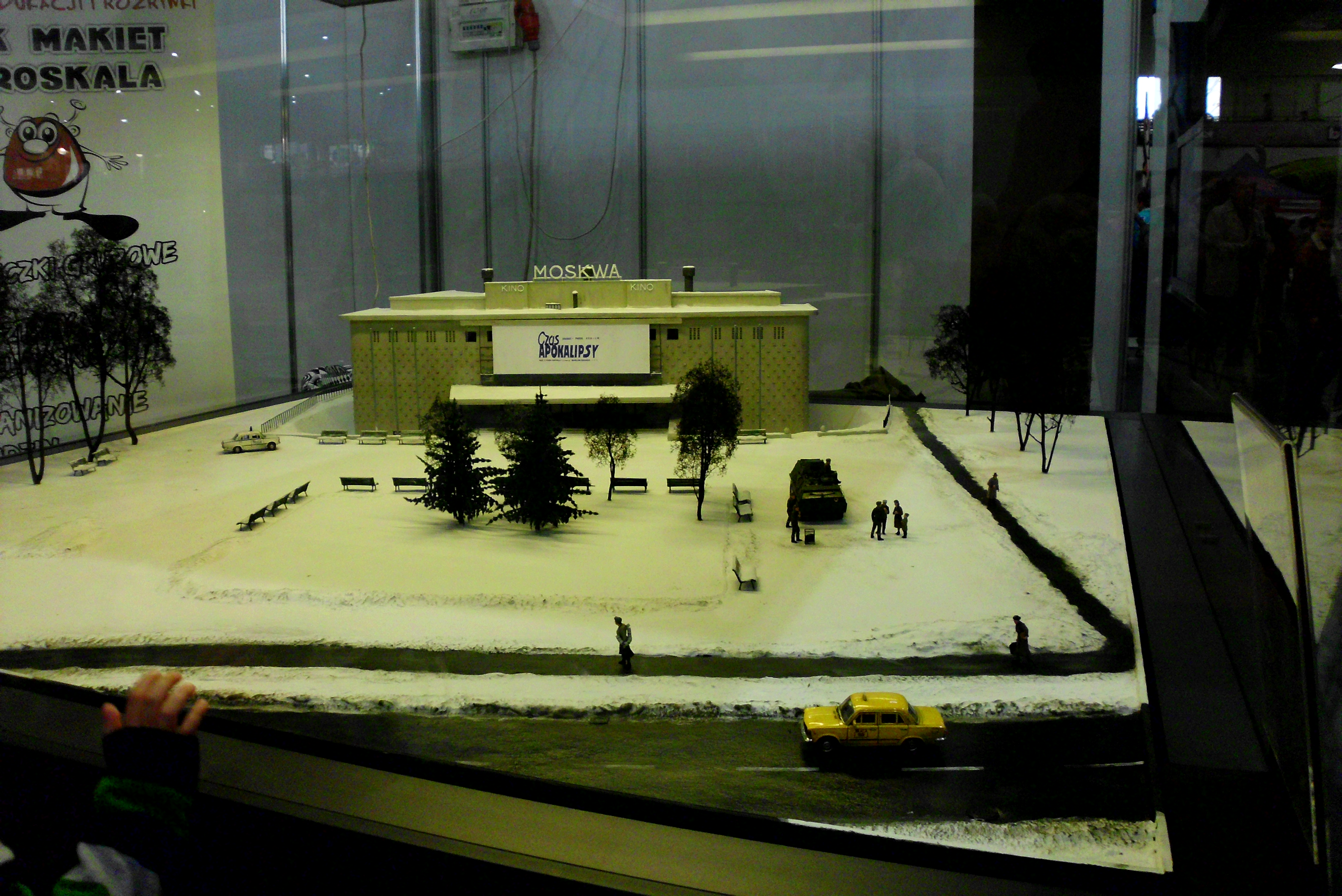 Hobby 2013 październik